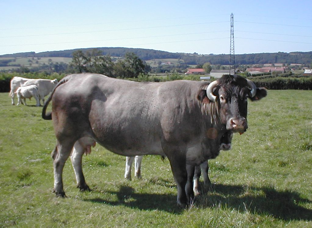 Une race de vache bazadaise dans un pré. Photo prise par Cyrille BERNIZET à Diverti'Parc : Parc de loisirs nature en Bourgogne du Sud. Publiée sous licence GNU Free Documentation avec l'accord de Diverti'Parc --Cyrille BERNIZET 17 avr 2005 à 19:06 (CEST)